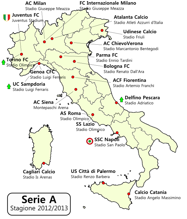 Distribuzione geografica squadre Serie A 2012-2013